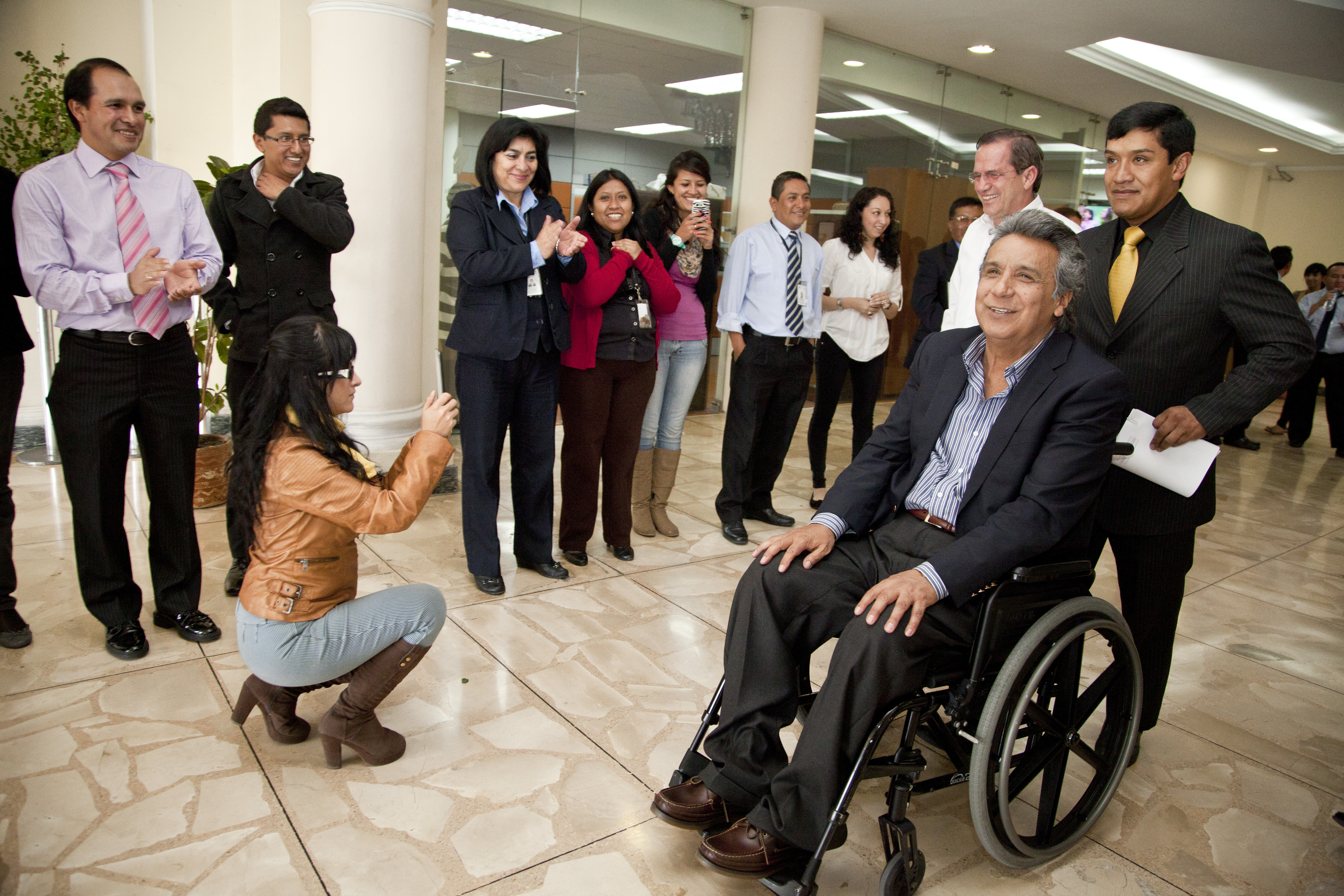 Quito (Ecuador), 10 de febrero 2014. A medio día el Canciller Ricardo Patiño recibió la visita del exvicepresidente del Ecuador y actual enviado especial de Naciones Unidas para temas de discapacidad y accesibilidad.